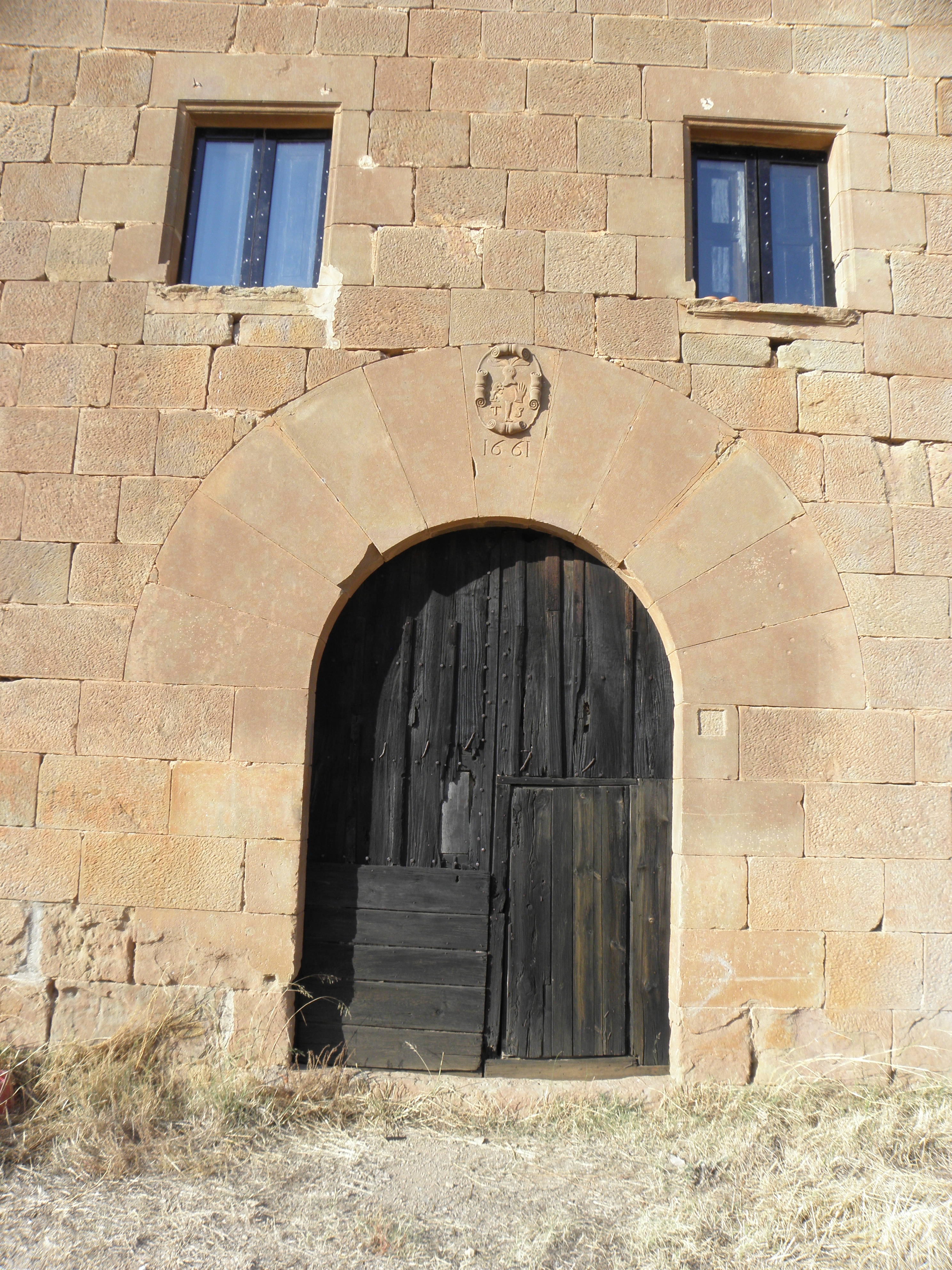 La porta principal de la rectoria de Sallent de Solsonès, municipi de Pinell de Solsonès.